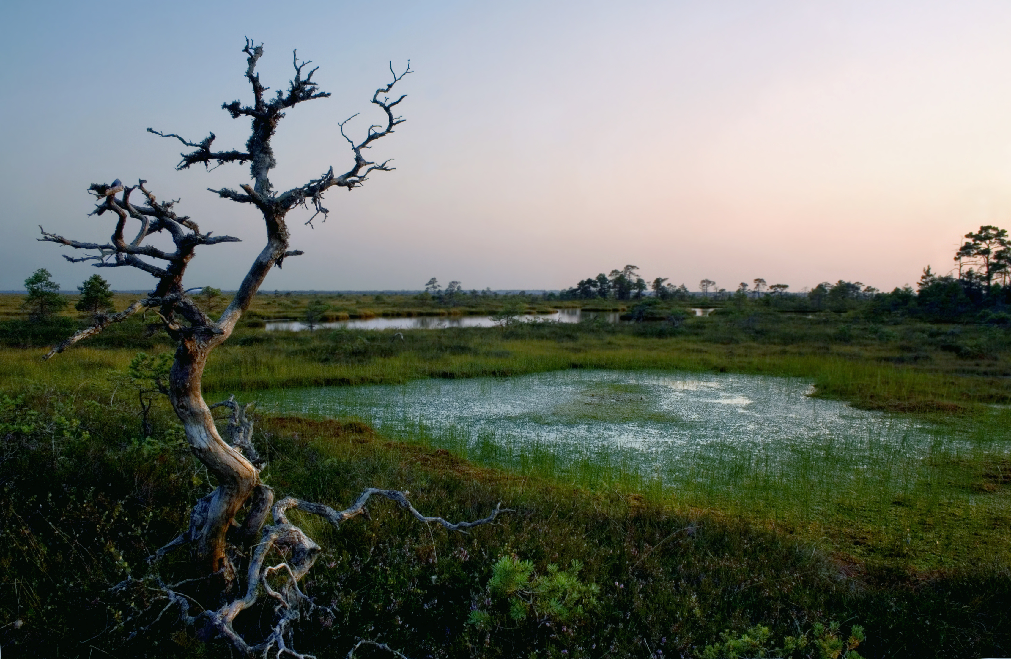 Huviäratav Marimetsa raba